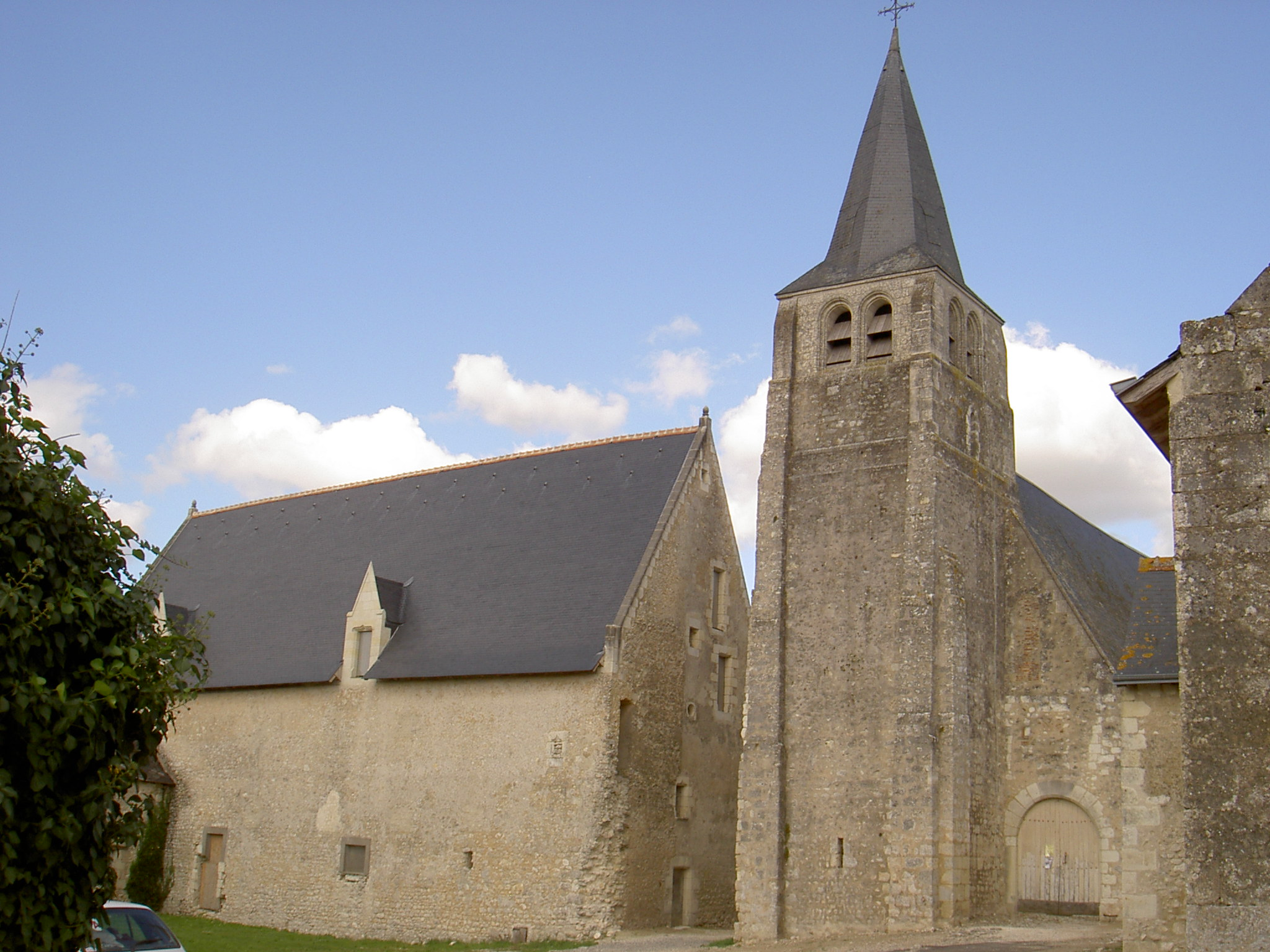 L'église Saint-Sulpice du Louroux .